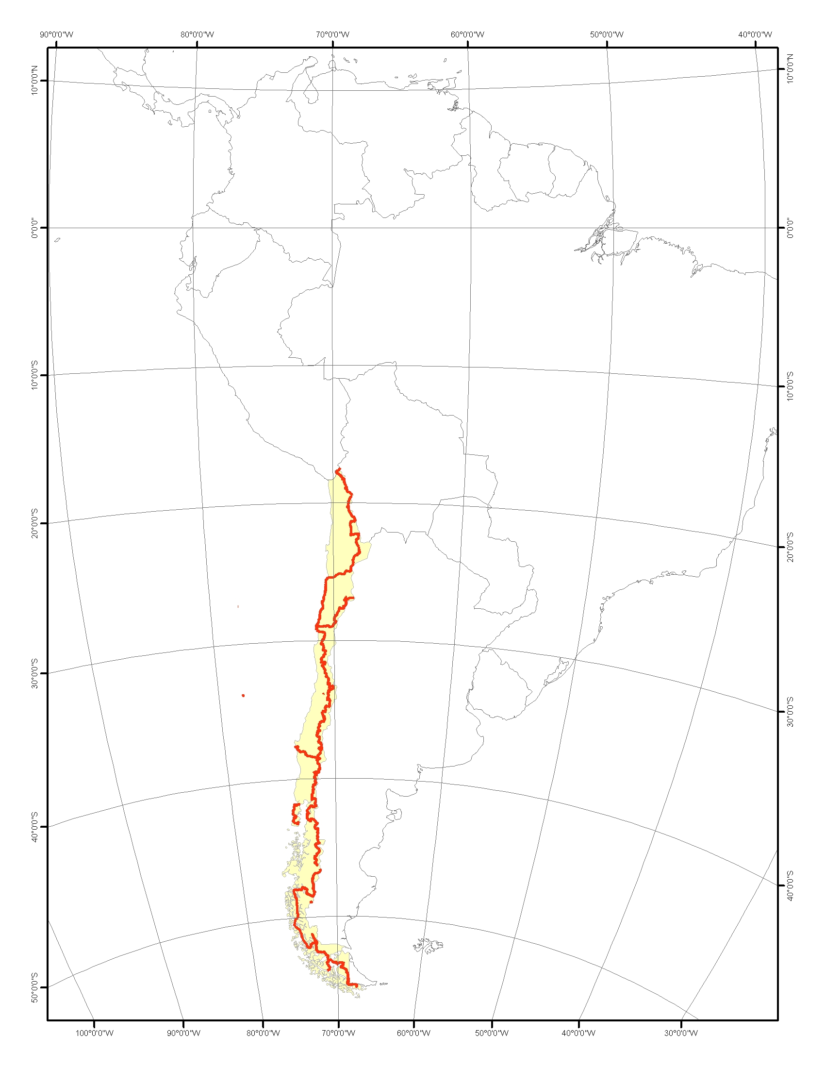 Mapa de Sudamerica, mostrando situación del pais y Sendero de Chile